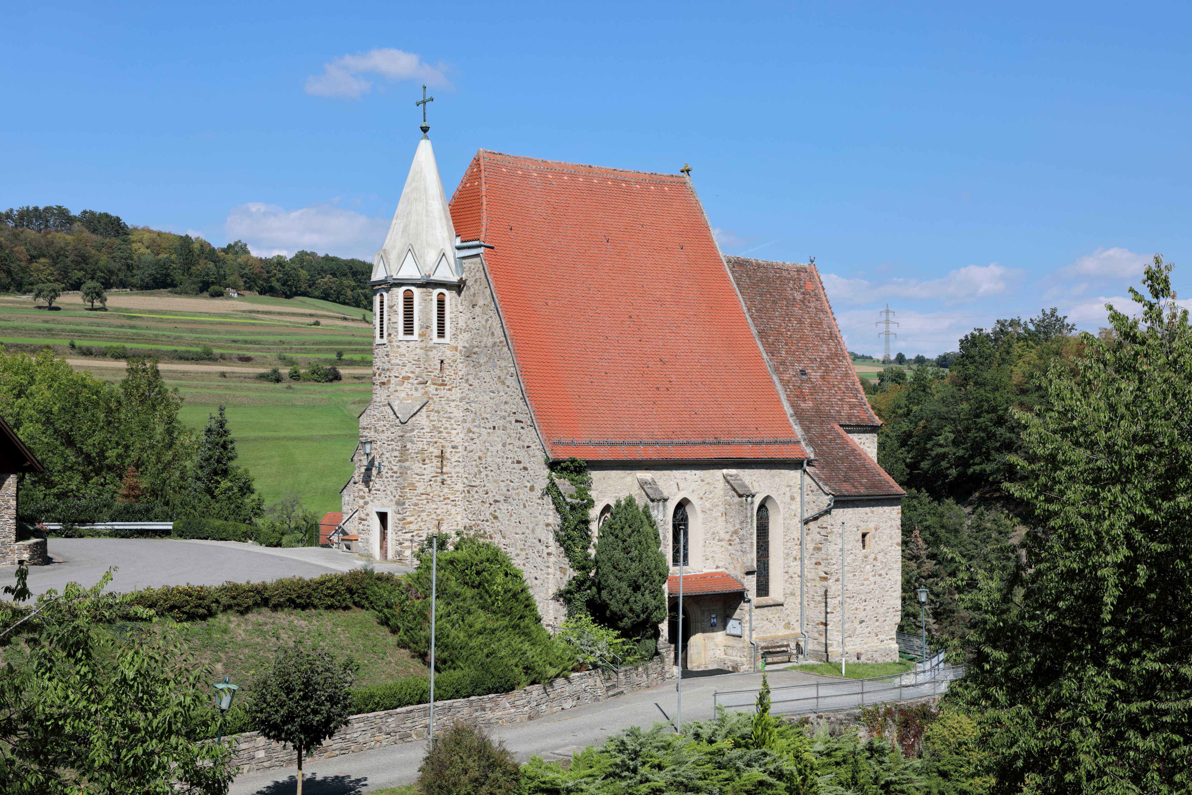 Südansicht der röm.-kath. Pfarrkirche hl. Bartholomäus in Pöbrig, ein Ortsteil der niederösterreichischen Marktgemeinde Artstetten-Pöbring. Ein spätgotischer Sakralbau (um 1500) aus unverputztem Bruchsteinmauerwerk, der Ende des 18. Jahrhunderts innen umgebaut wurde.